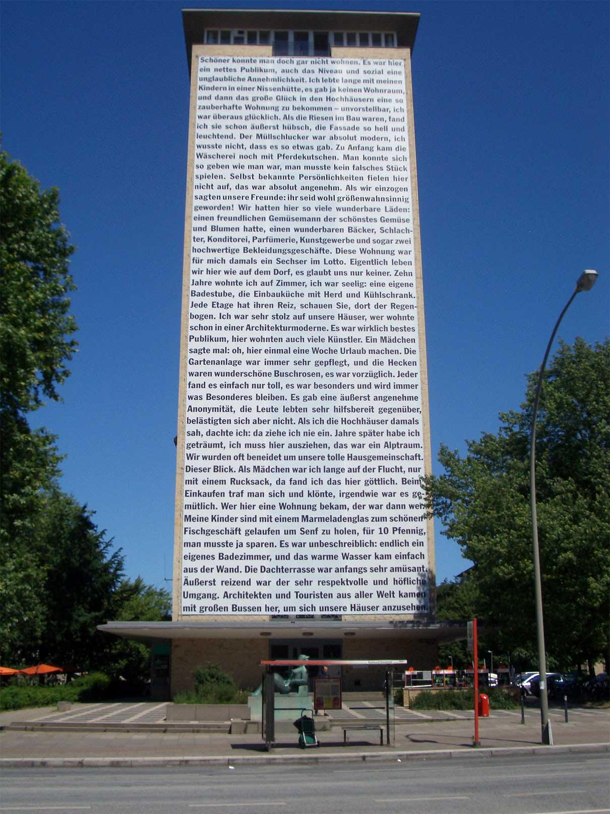 "Transparent Grindelhochhäuser" Künstlerische Arbeit von Sigrid Sandmann,Hamburg Temporäre Installation, Kunst im öffentlichen Raum: Juni 2007 bis September 2007 Fassade des Hauses Hallerstraße 1 zum 50.jährigen Jubiläum der Grindelhochhäuser in Hamburg